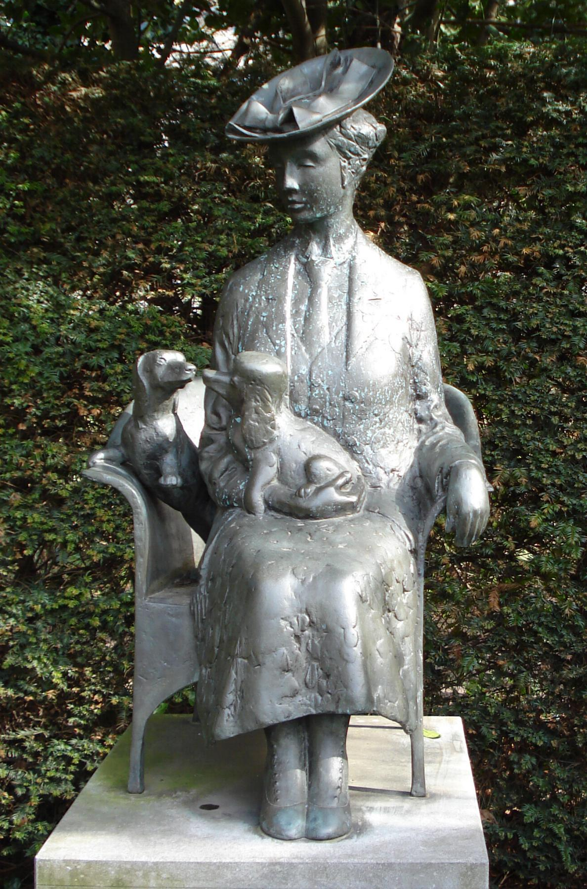 Den Haag, Wassenaarseweg. Kunstwerk "Gravin van Bylandt" van Evert den Hartog. Den Haag/The Netherlands.